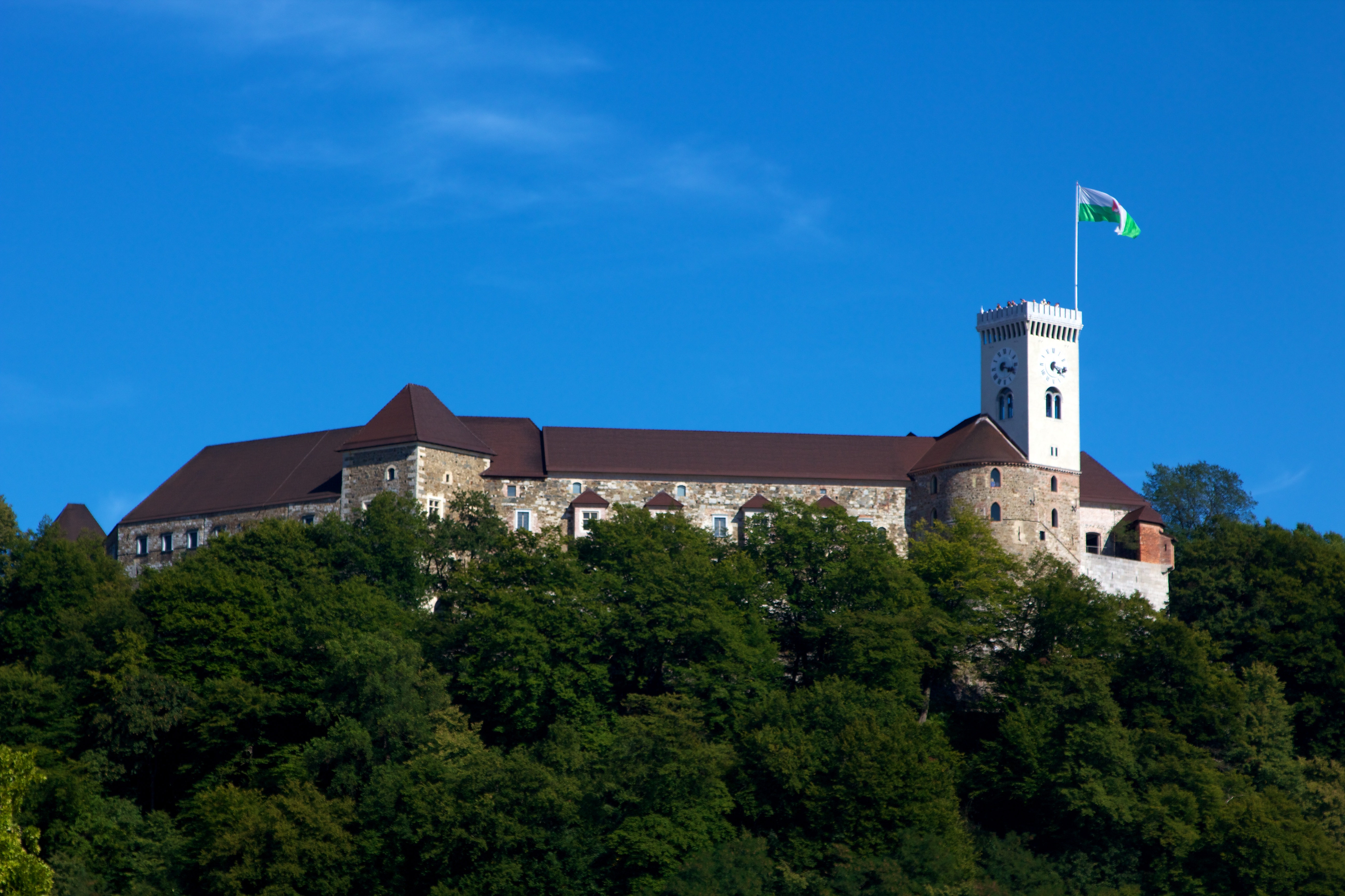 Castillo de Ljubljana 021